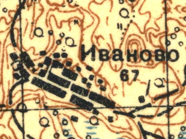 Топографическая карта Ленинградской области, квадрат О-36-15-А (Шапки), деревня Иваново